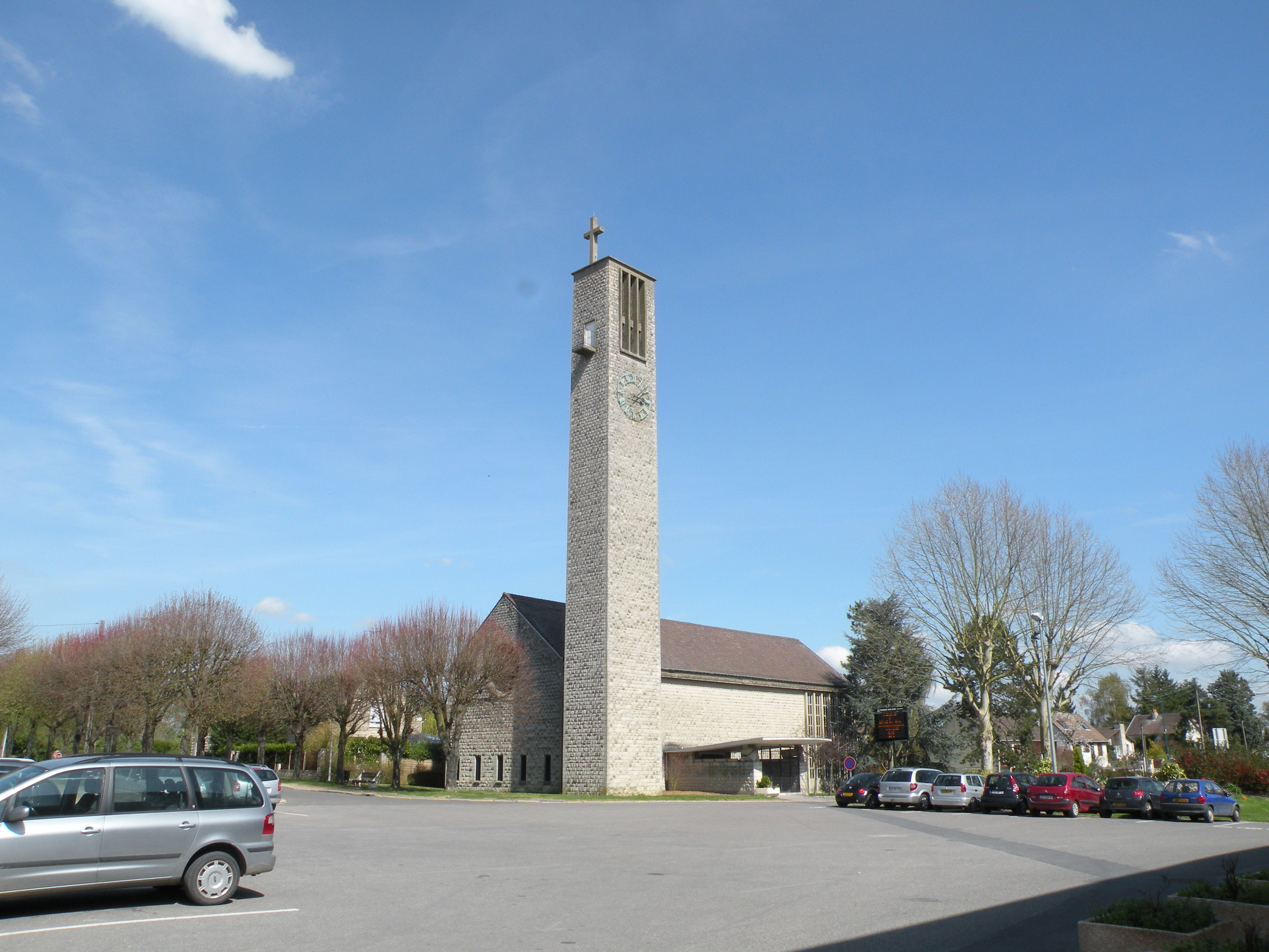 Église de Bernes-sur-Oise (Val-d'Oise, France)